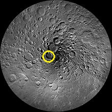 埃尔米特环形山的位置照片